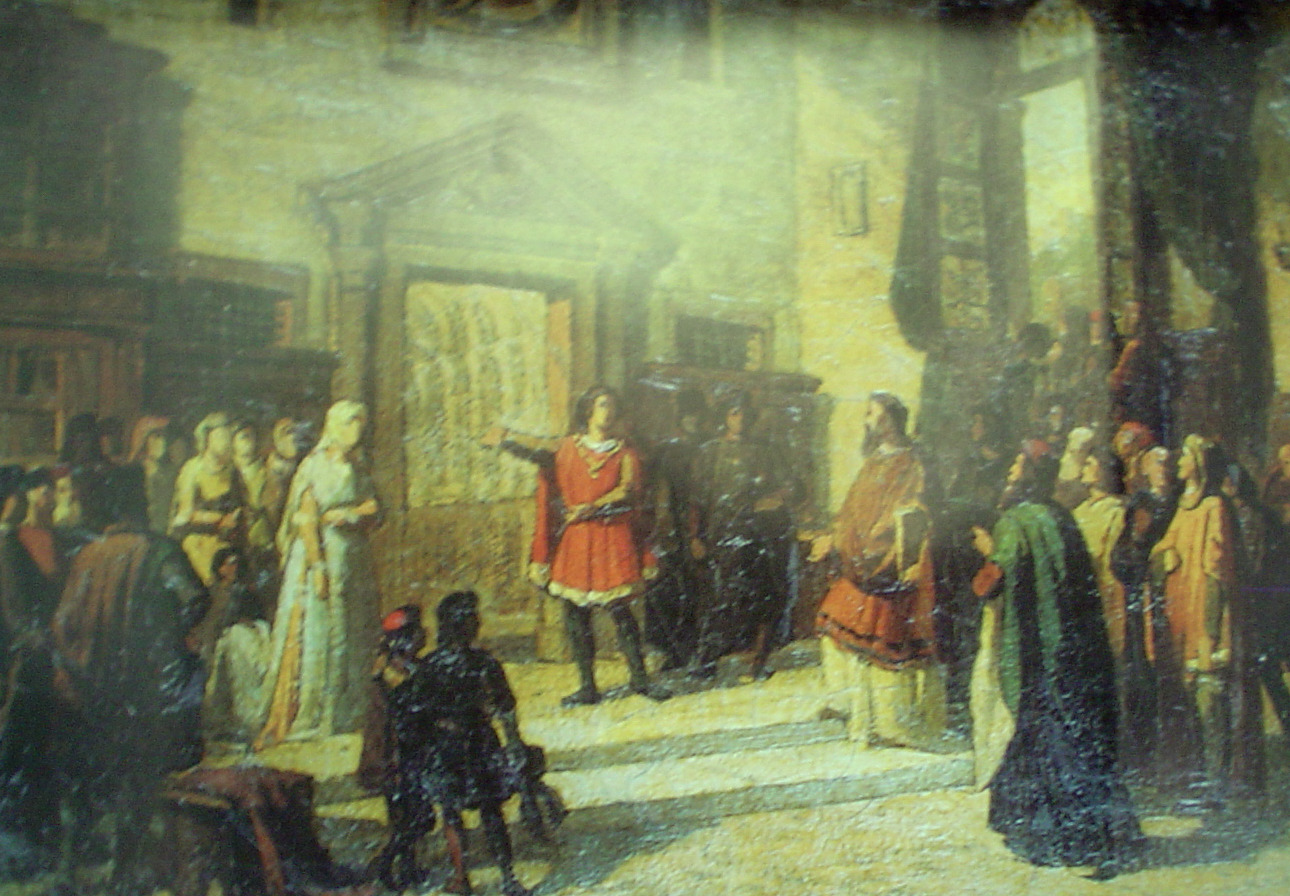 La Bozza di un dipinto ottocentesco che rappresenta Malatesta Novello, con la moglie Violante, nel momento dell'inaugurazione della Biblioteca Malatestiana